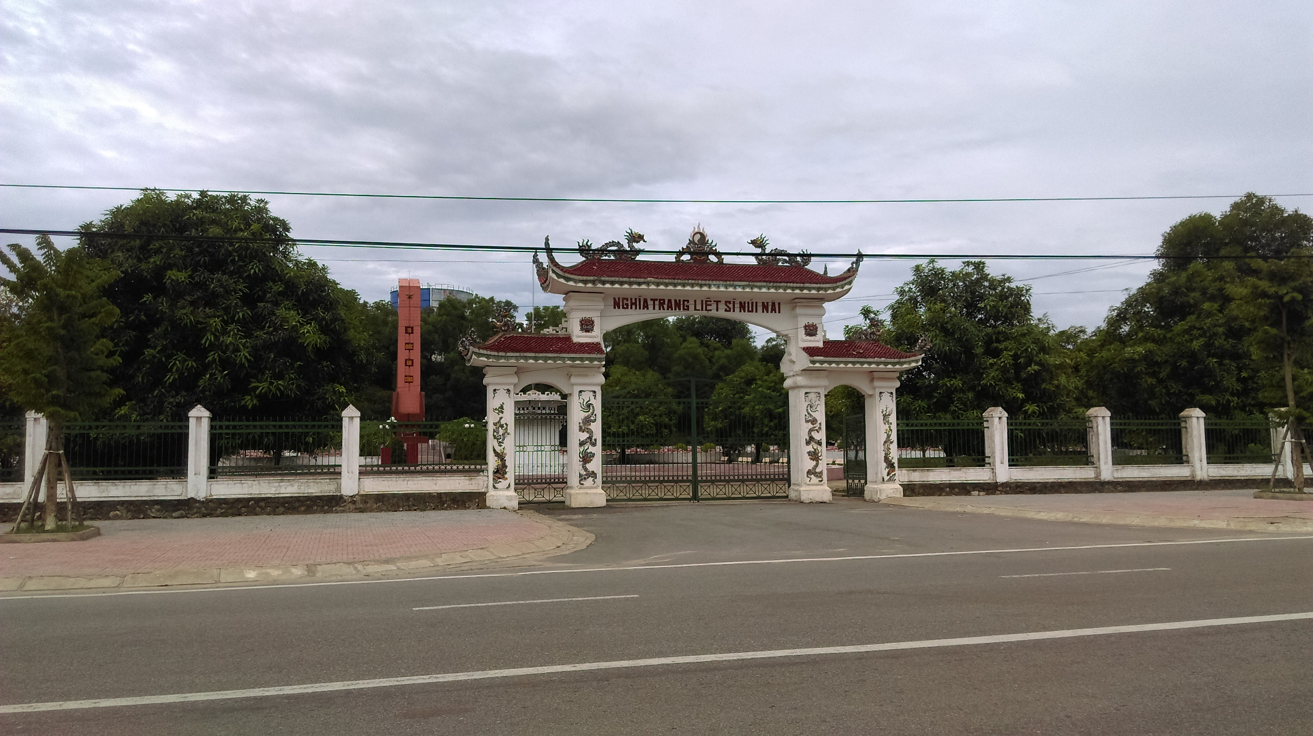 Nghĩa trang Liệt sĩ Núi Nài, Đại Nài, Hà Tĩnh